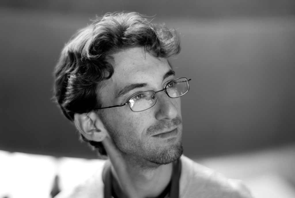 SJ Klein. Taken in Taipei, August 2007.